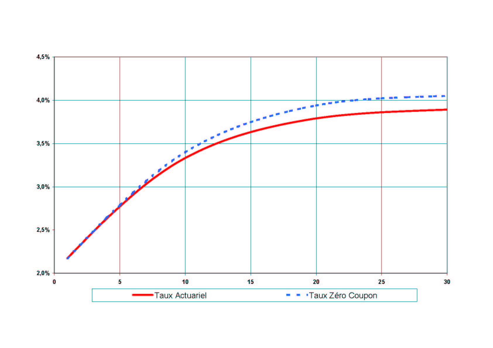 Exemple de courbe des taux Zéro-Coupon